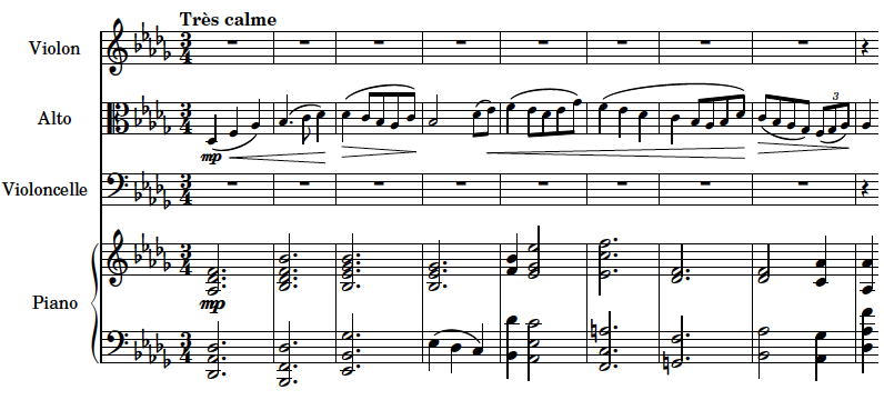 Exemple 1 créé avec Lilypond